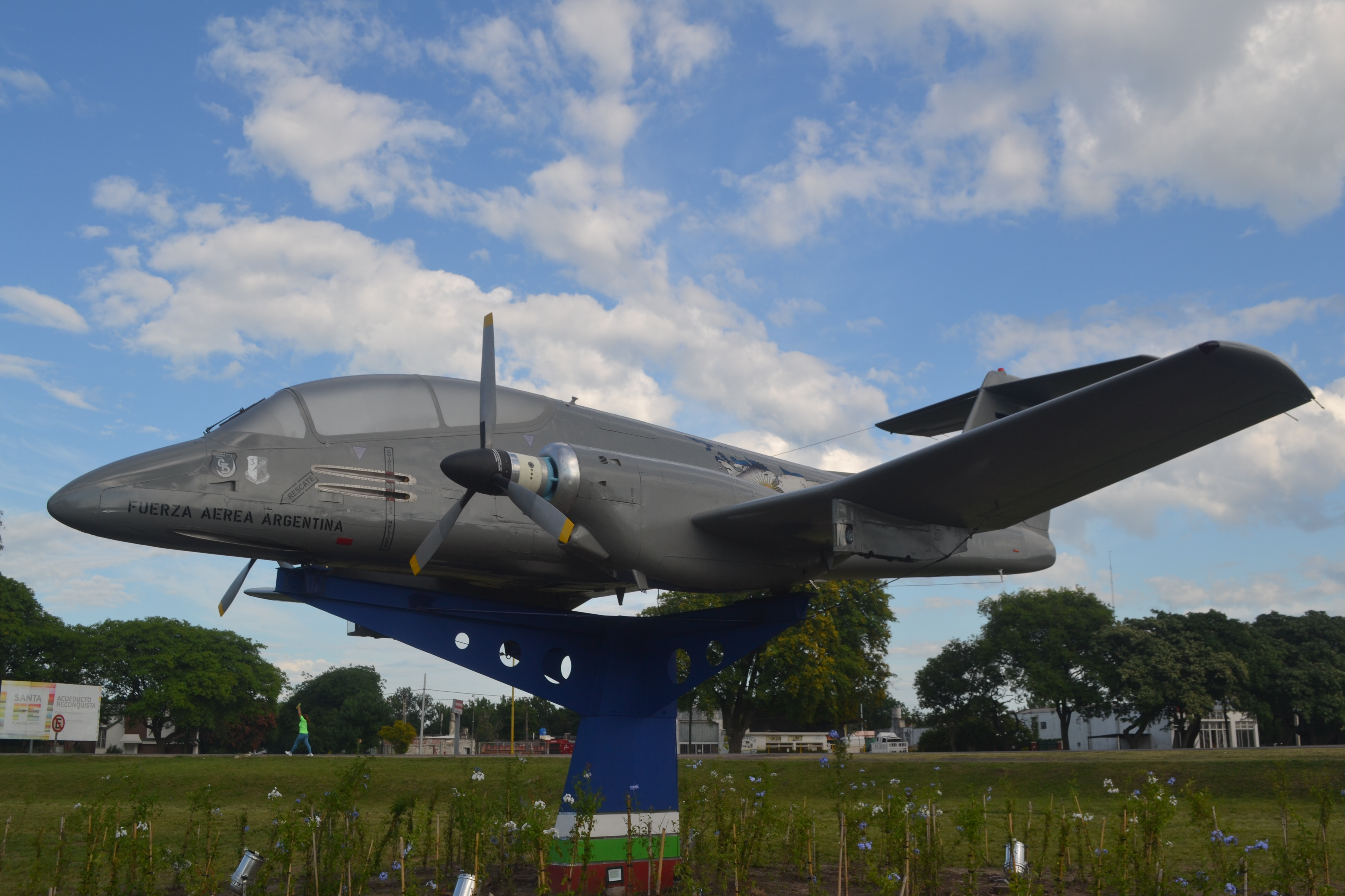 El FMA IA-58 Pucará es el nuevo ícono de la ciudad de Reconquista, ubicado en el acceso sur de la ciudad e inaugurado el 28 de octubre de 2018 como espacio de reflexión y de homenaje a quienes combatieron en la guerra de Malvinas. Se trata de un avión de ataque a tierra turbohélice, utilizado por la Fuerza Aérea Argentina, que combatió en la guerra de Malvinas y que antes de su acondicionamiento y actual reubicación se encontraba emplazado en la III Brigada Aérea de Reconquista.